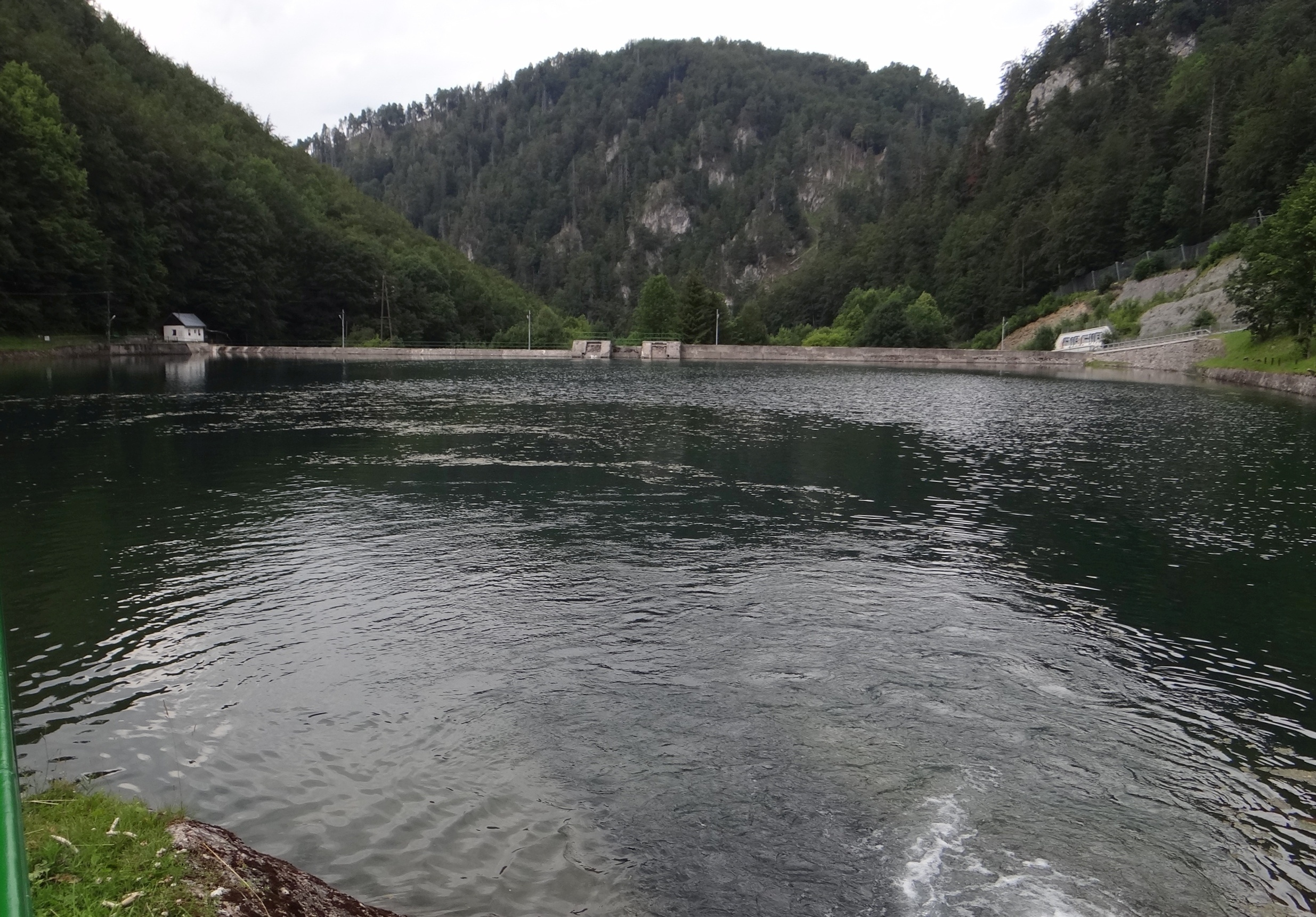 Motyčky. Zbiornik i zapora wodna